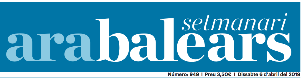 Títol de pàgina, el 6 d'abril de 2019 – el primer dia del nou setmanari.